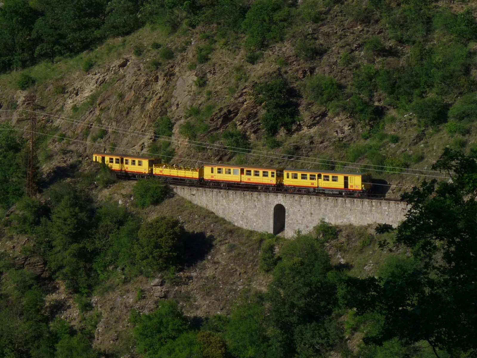 Le Train jaune vu de la route de Canaveilles, Pyrénées-Orientales, France